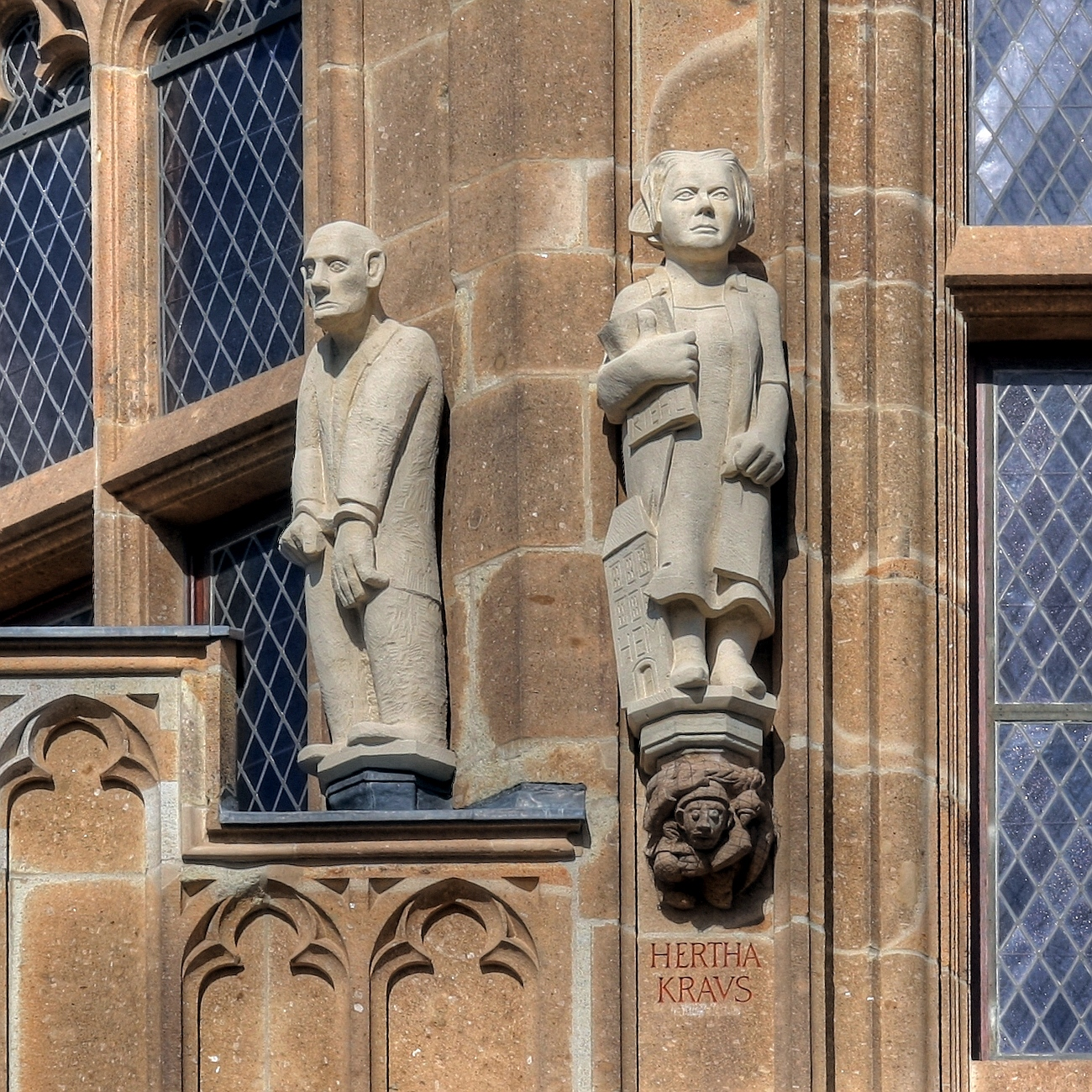 Rathausturm Köln mit den Figuren des Bernhard Letterhaus und der Hertha Kraus Details zu der Statue: Bildhauer der Letterhaus-Statue: Martin Krämer Bildhauer der Kraus-Statue: Majka Wichner Details zu der Konsole: Thema der Konsole unter der Letterhaus-Statue: Keine Thema der Konsole unter der Kraus-Statue: „Einer, der sich mit fremden Federn schmückt“. Bildhauer: Gerd Haas